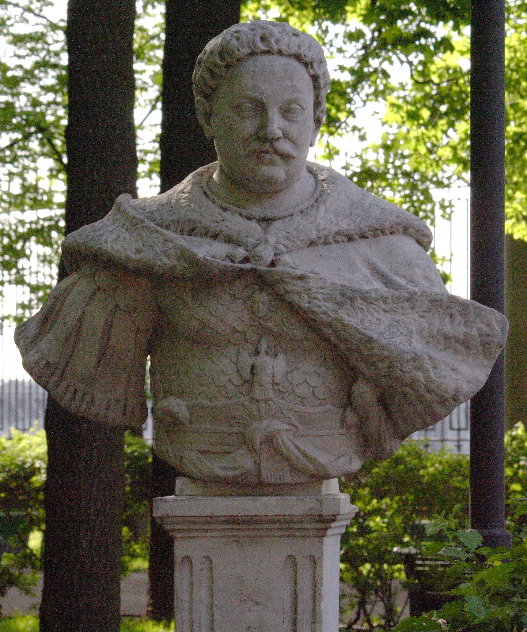 бюст Яна Собесского